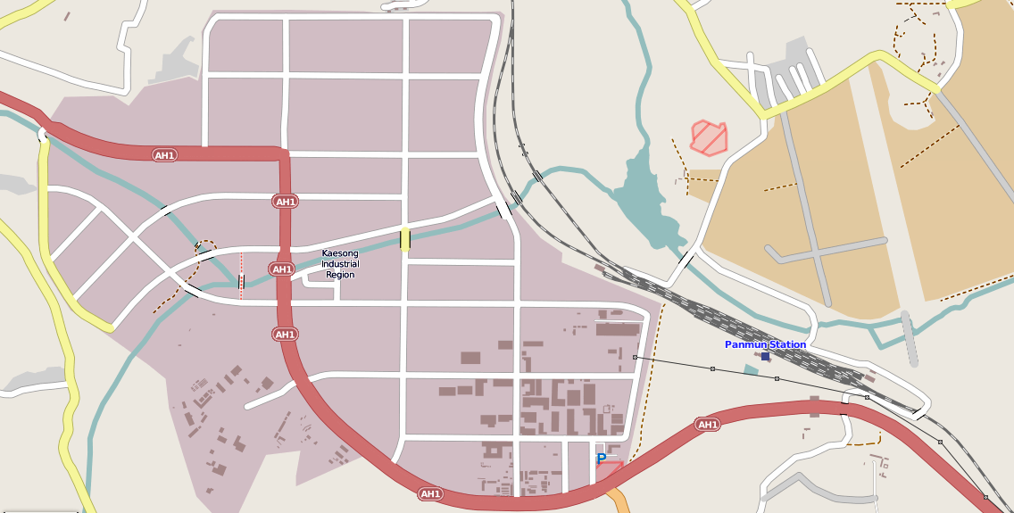 개성공업단지 (오픈스트리트맵)